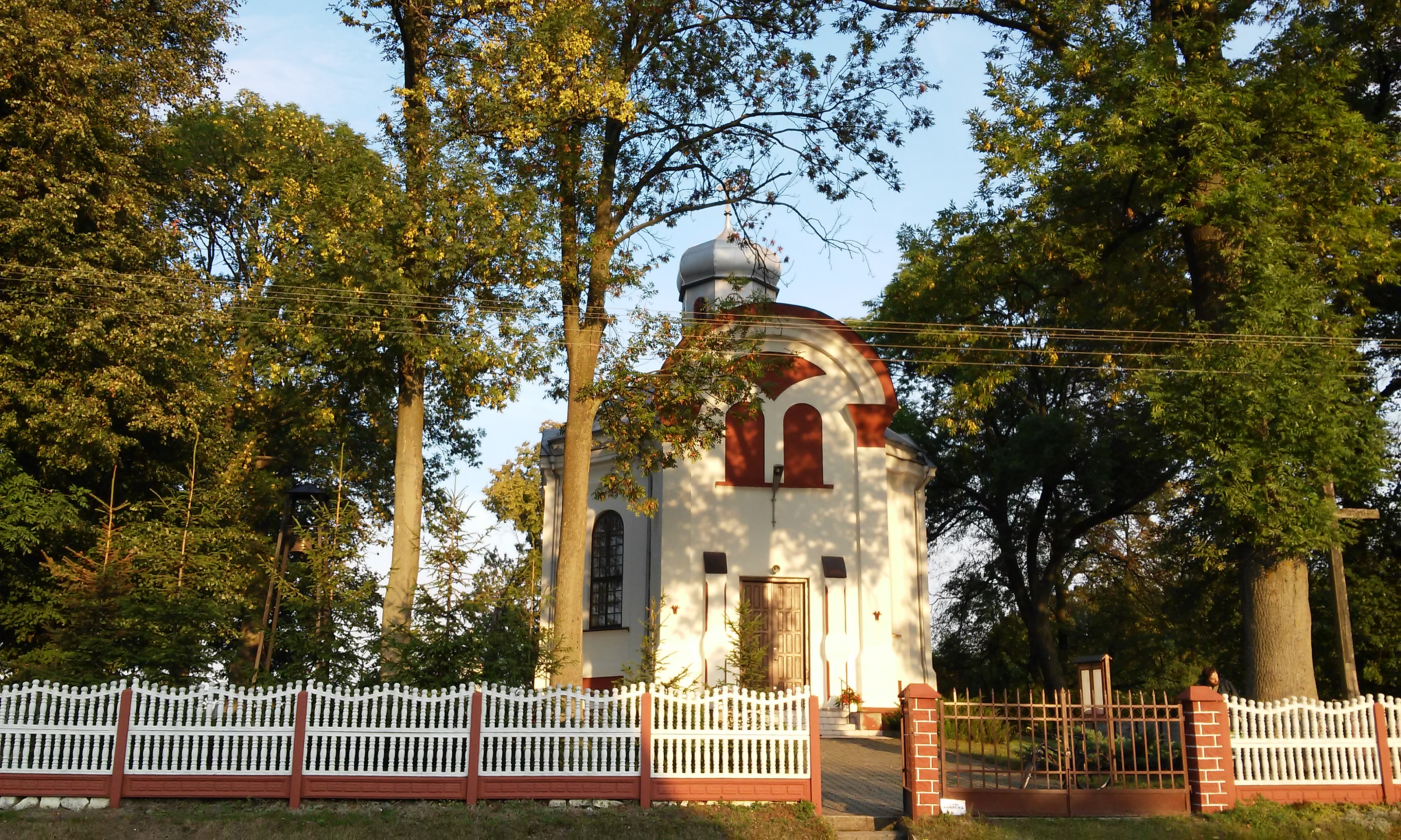 Dawna cerkiew, ob. filialna kaplica rzymskokatolicka w Bezku